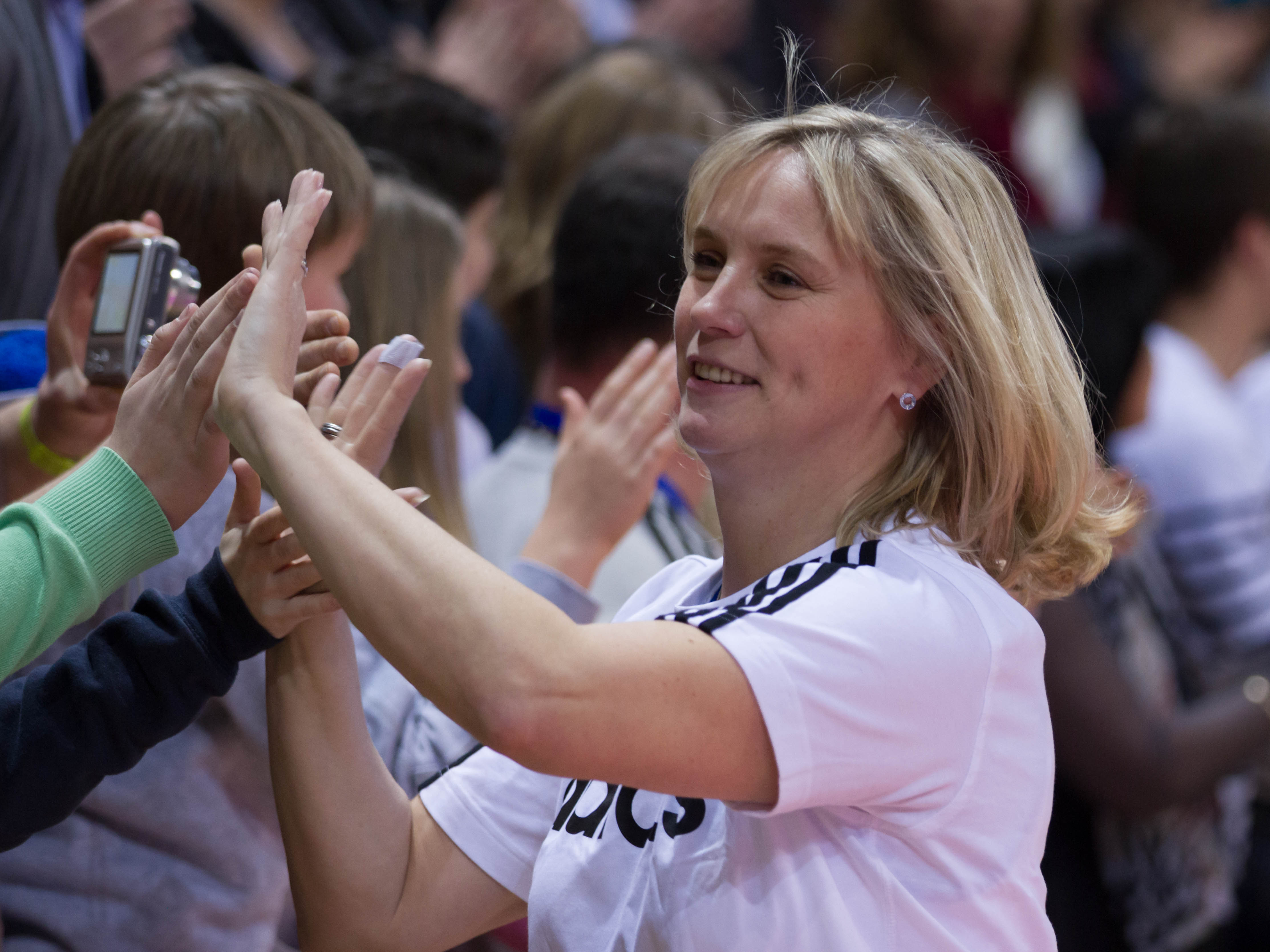 Yannick Souvré, match de gala championnes de cœur